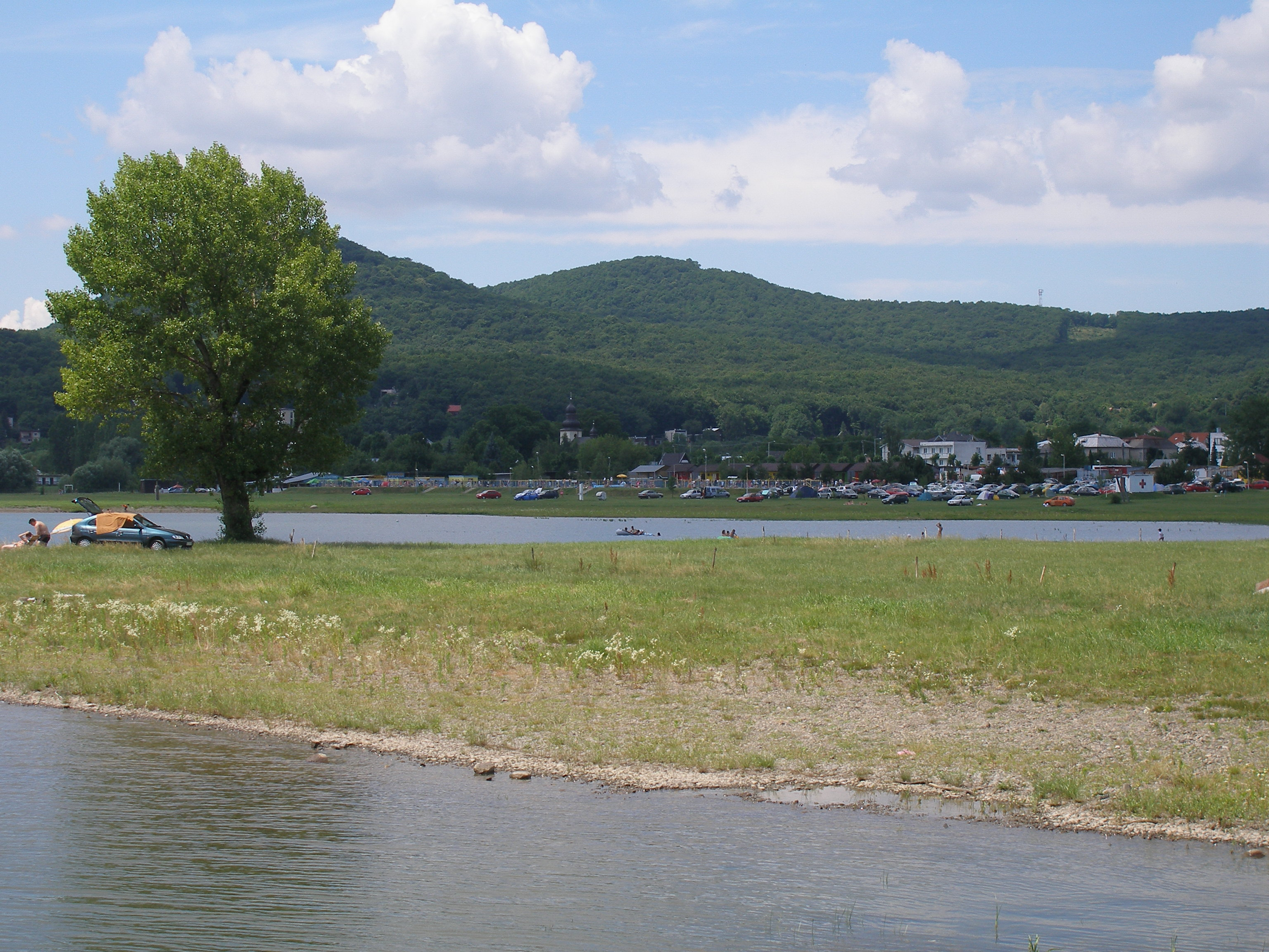 Vodná nádrž na Zemplíne, okr.Michalovce